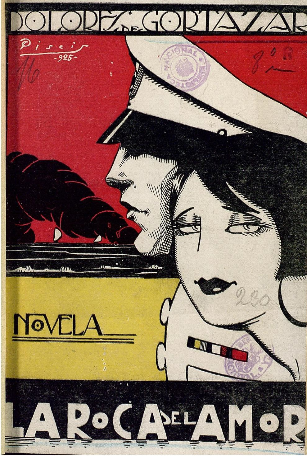 Dolores de Gortázar Serantes: La roca del amor, novela